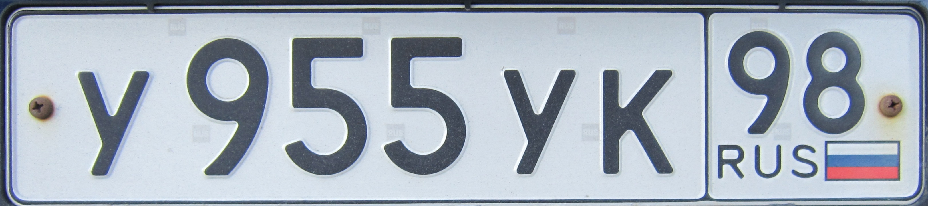 Russische kentekenplaat